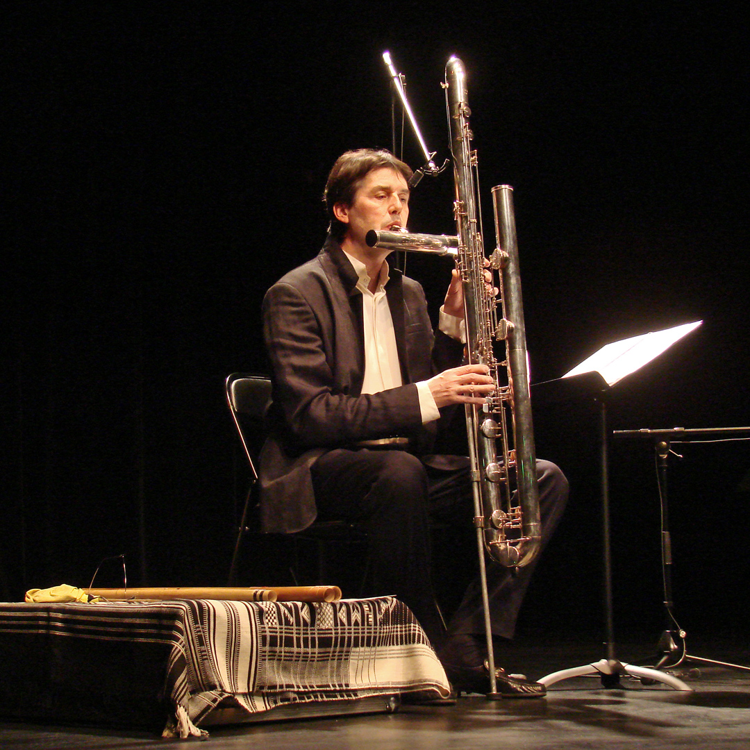 Concert "Tradition et musiques d'aujourd'hui" par Ling Ling Yu (Pipa) et Henri Tournier (flûte octobasse) Vendredi 12 décembre dans l'auditorium du musée Guimet Les sonorités très graves de cet instrument, parfaitement maitrisé par H. Tournier, se marient parfaitement avec celles plus sèches et métalliques du pipa de Lingling Yu. Une musique étrange et inédite en résulte qui étonne et charme les oreilles les plus blasées. site d'Henri Tournier